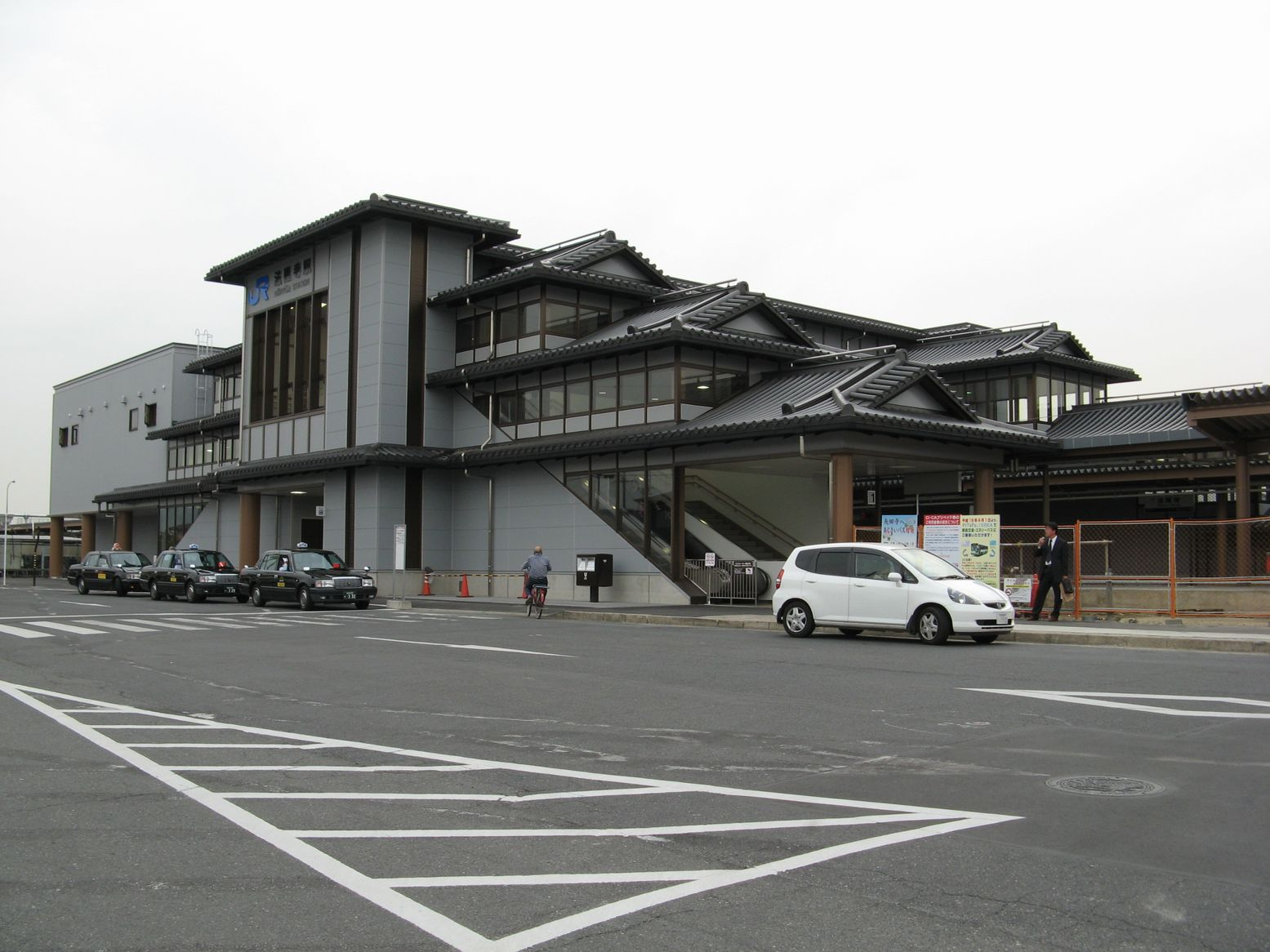 法隆寺駅